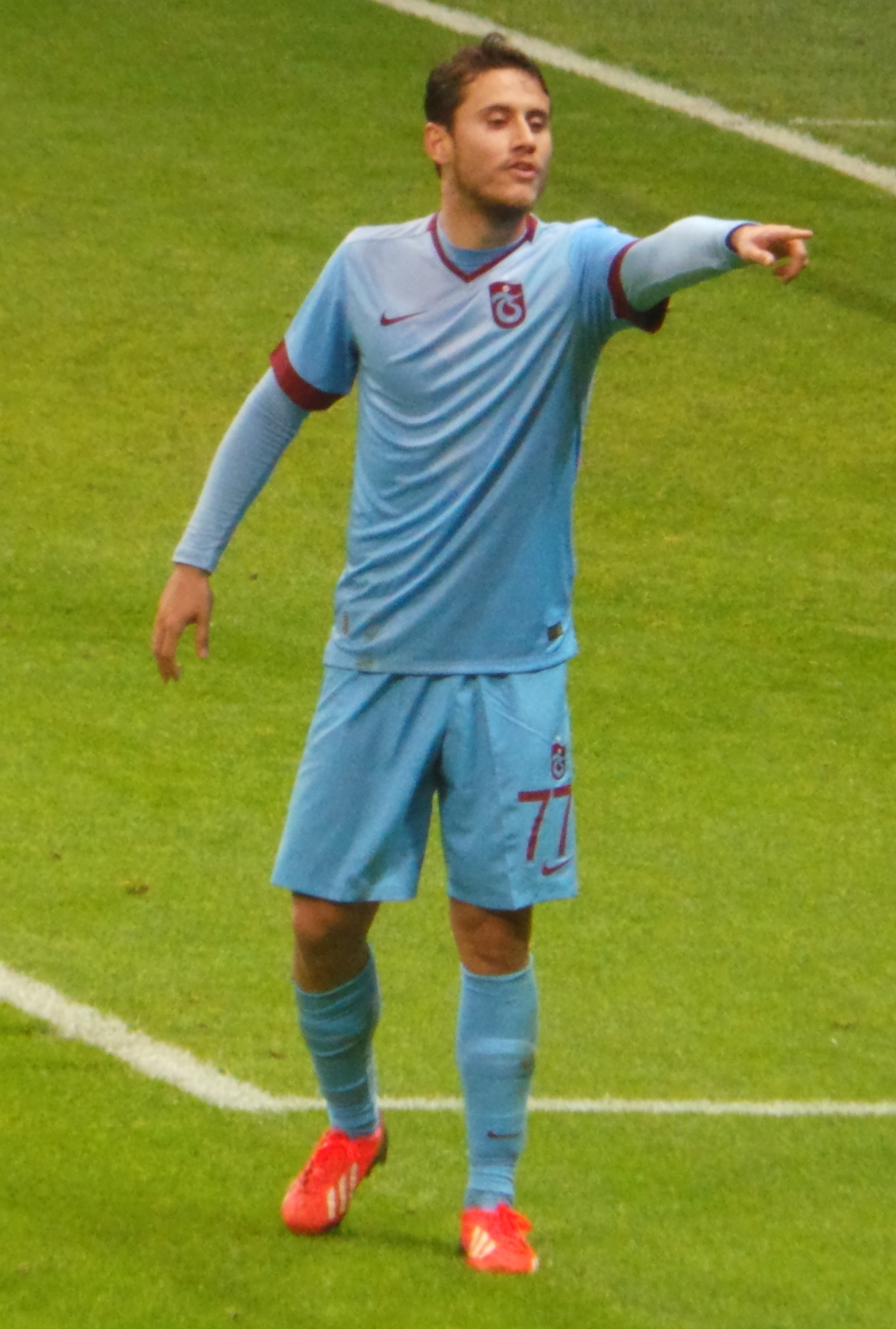 Musa Nizam Galatasaray maçında